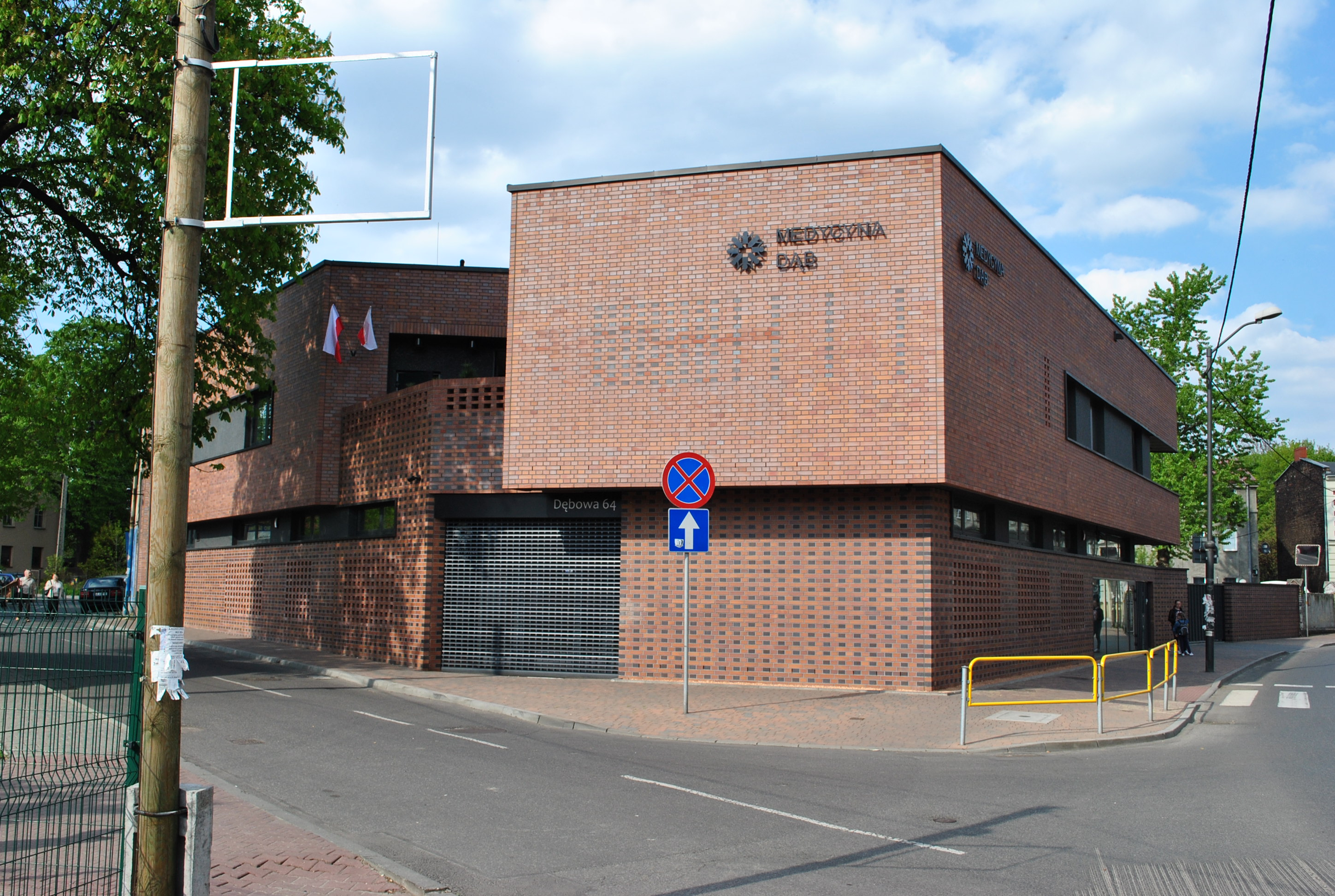 Katowice, Dąb. Ulica Dębowa